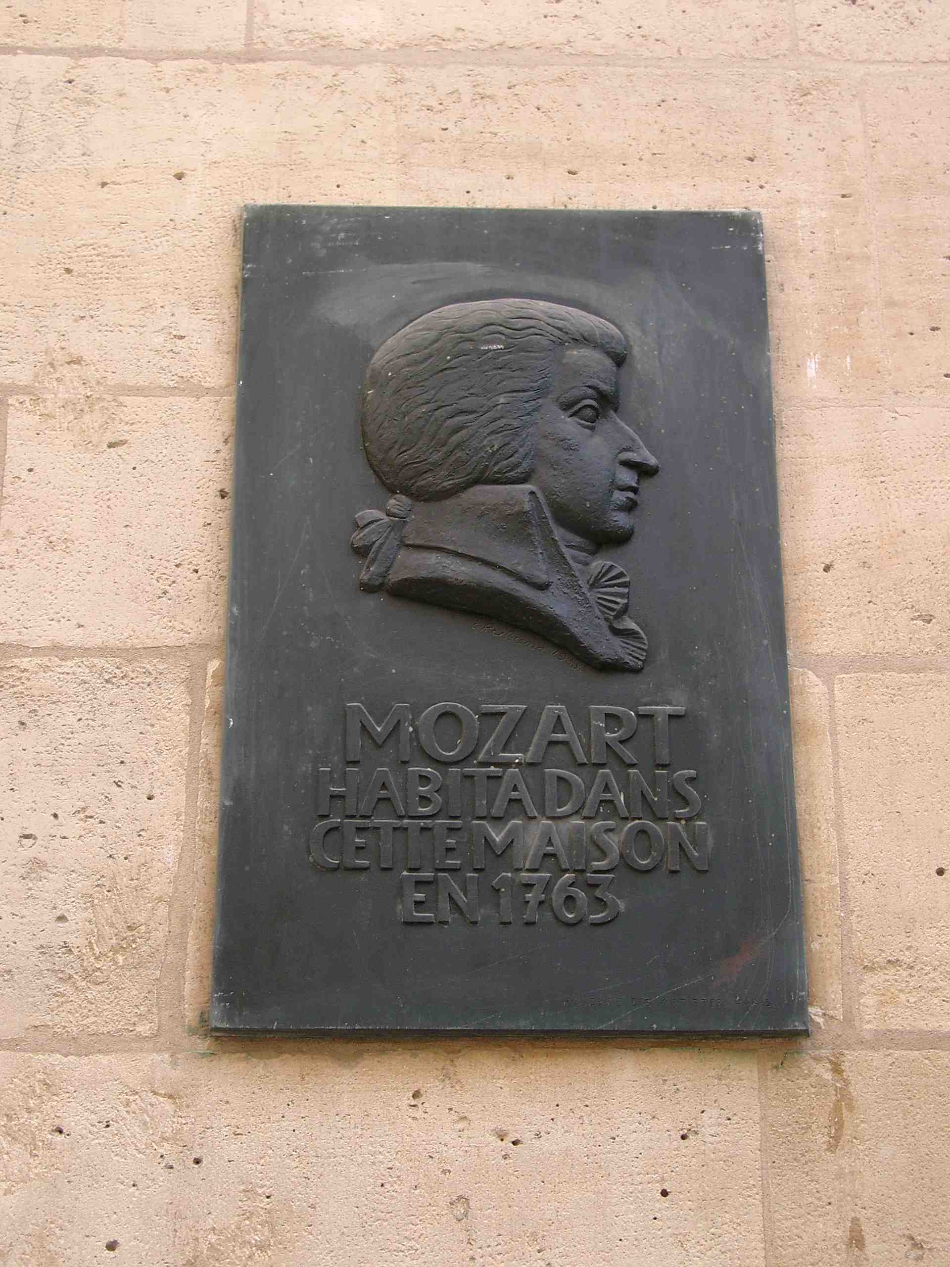 Inscription about Mozarts visit in Paris 1763, Hôtel de Beauvais, Rue Francois Miron